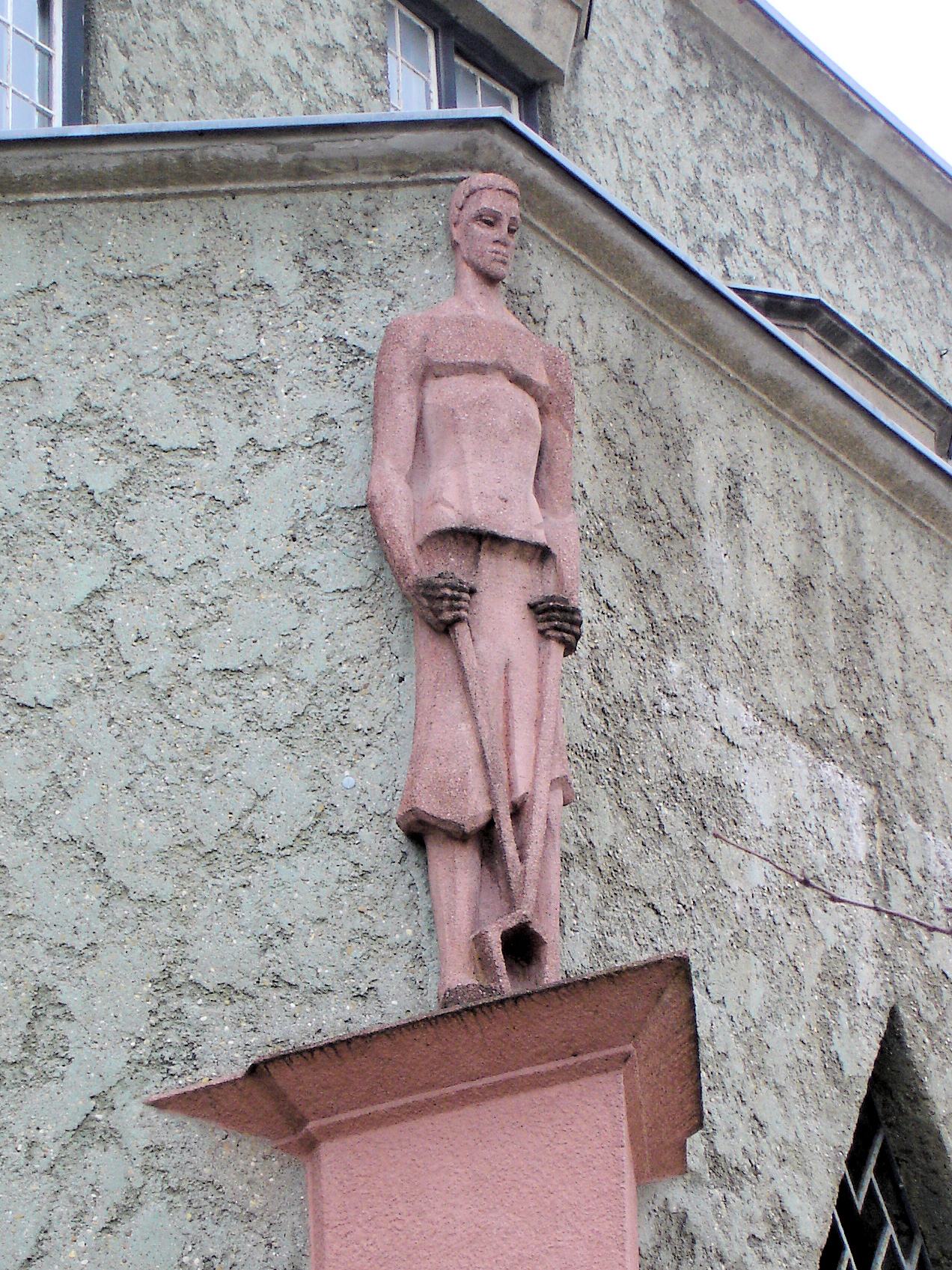 Kunststeinplastik "Eisen" Parkstraße Rostock